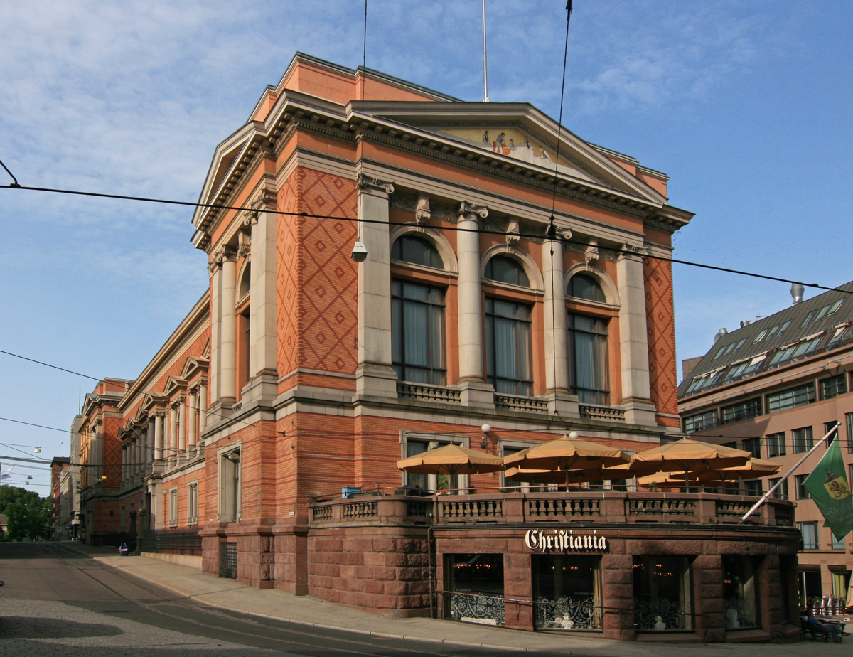 Frimurerlosjen, Nedre Vollgate 19, Oslo. Bygd 1890.94; arkitekt Henrik Nissen.